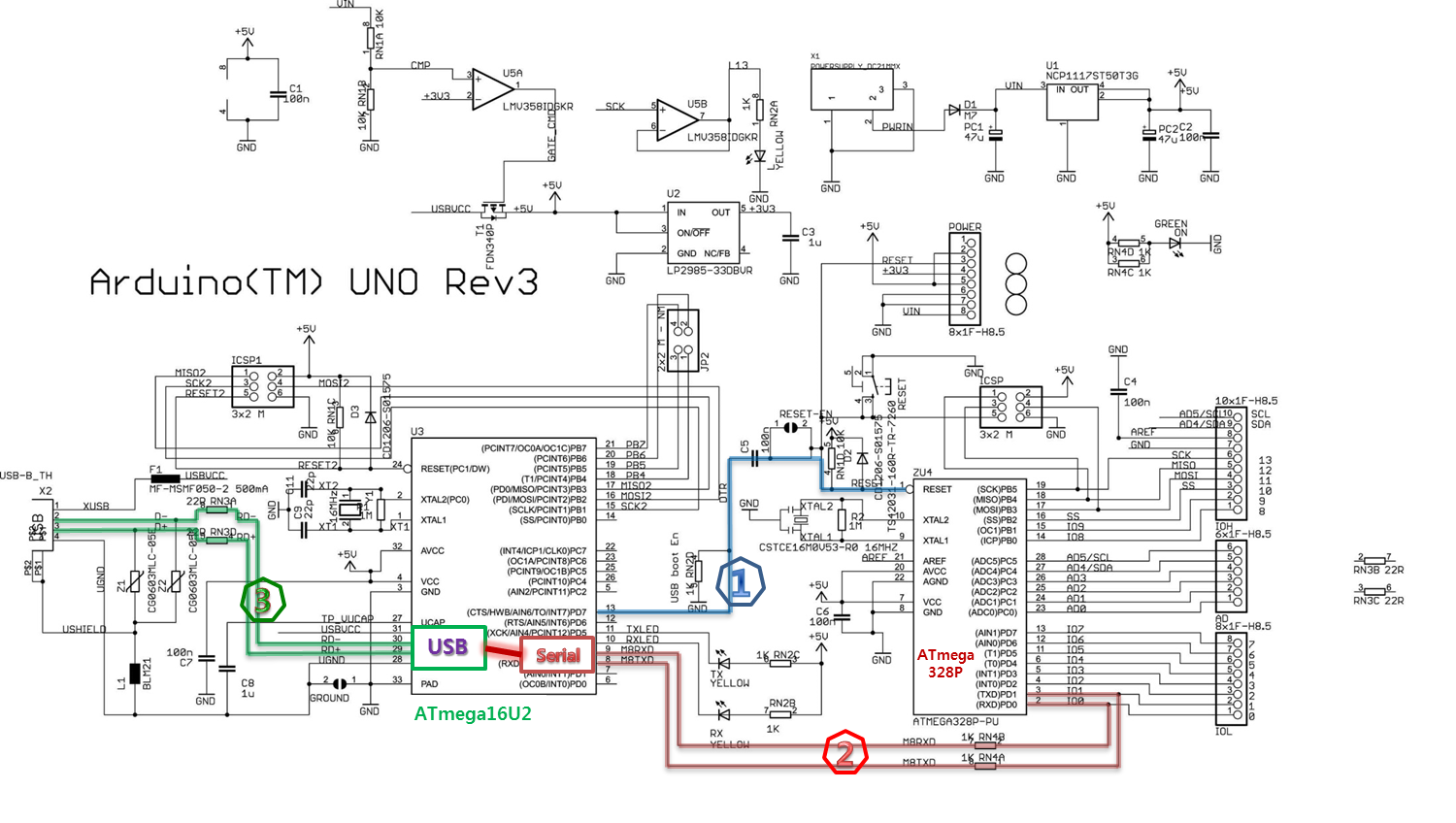 Arduino UNO 업로드